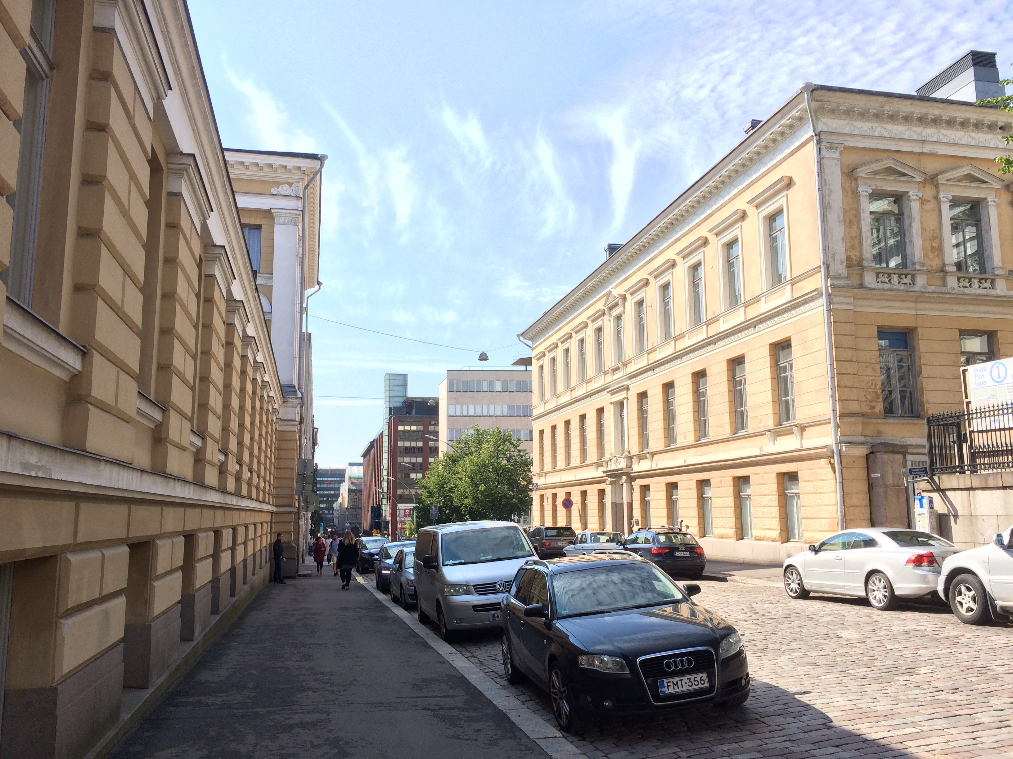 Helsingin Yliopistonkatua Unioninkadun päästä länteen päin. Oikealla Kansalliskirjasto ja vasemmalla Helsingin yliopiston päärakennus.